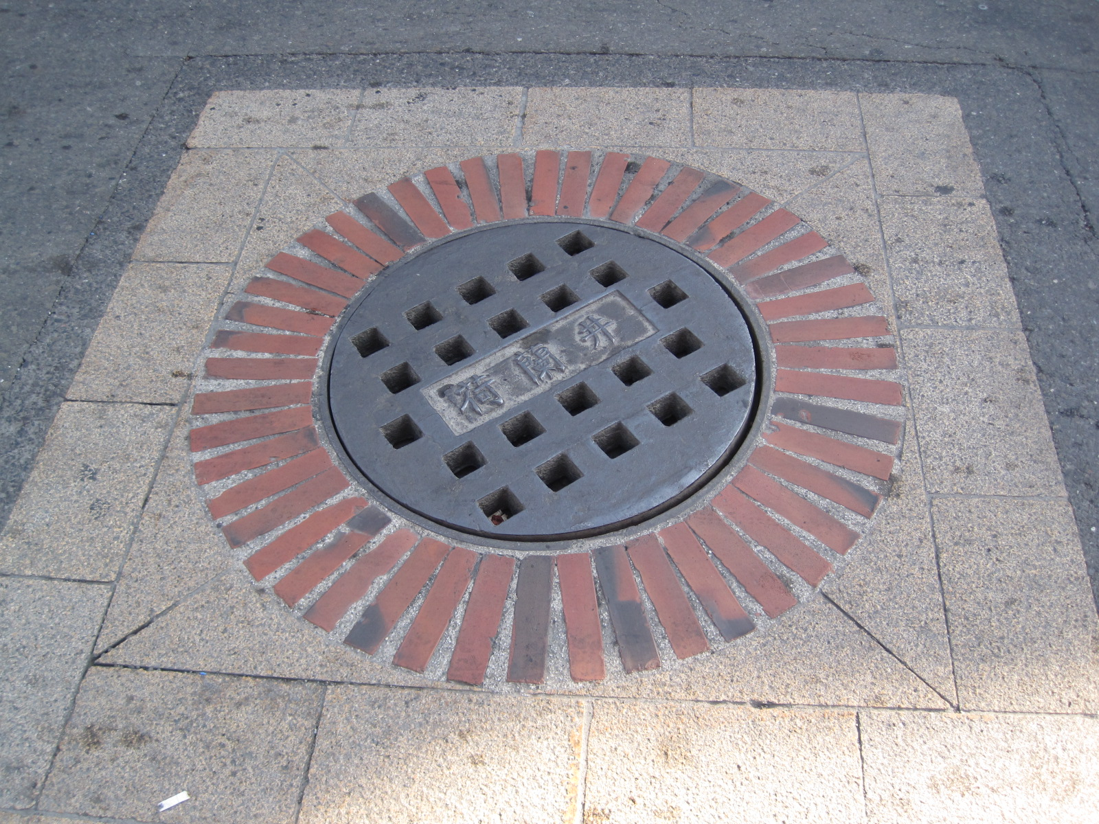 中文（台灣）: 位在臺灣臺南市善化區的荷蘭古井。